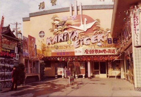 昔の刈谷映劇